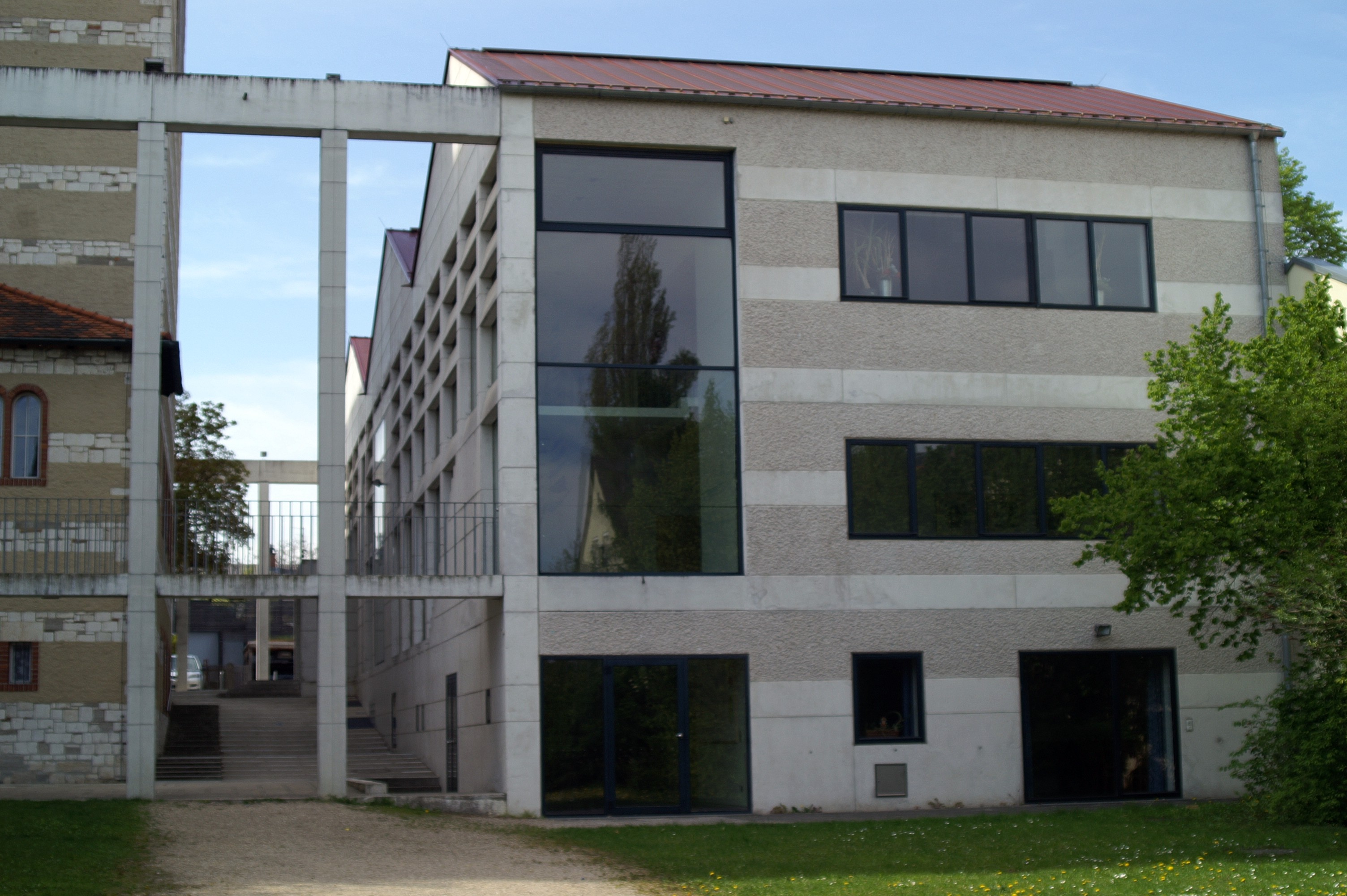 Pfarrheim St. Wolfgang Regensburg